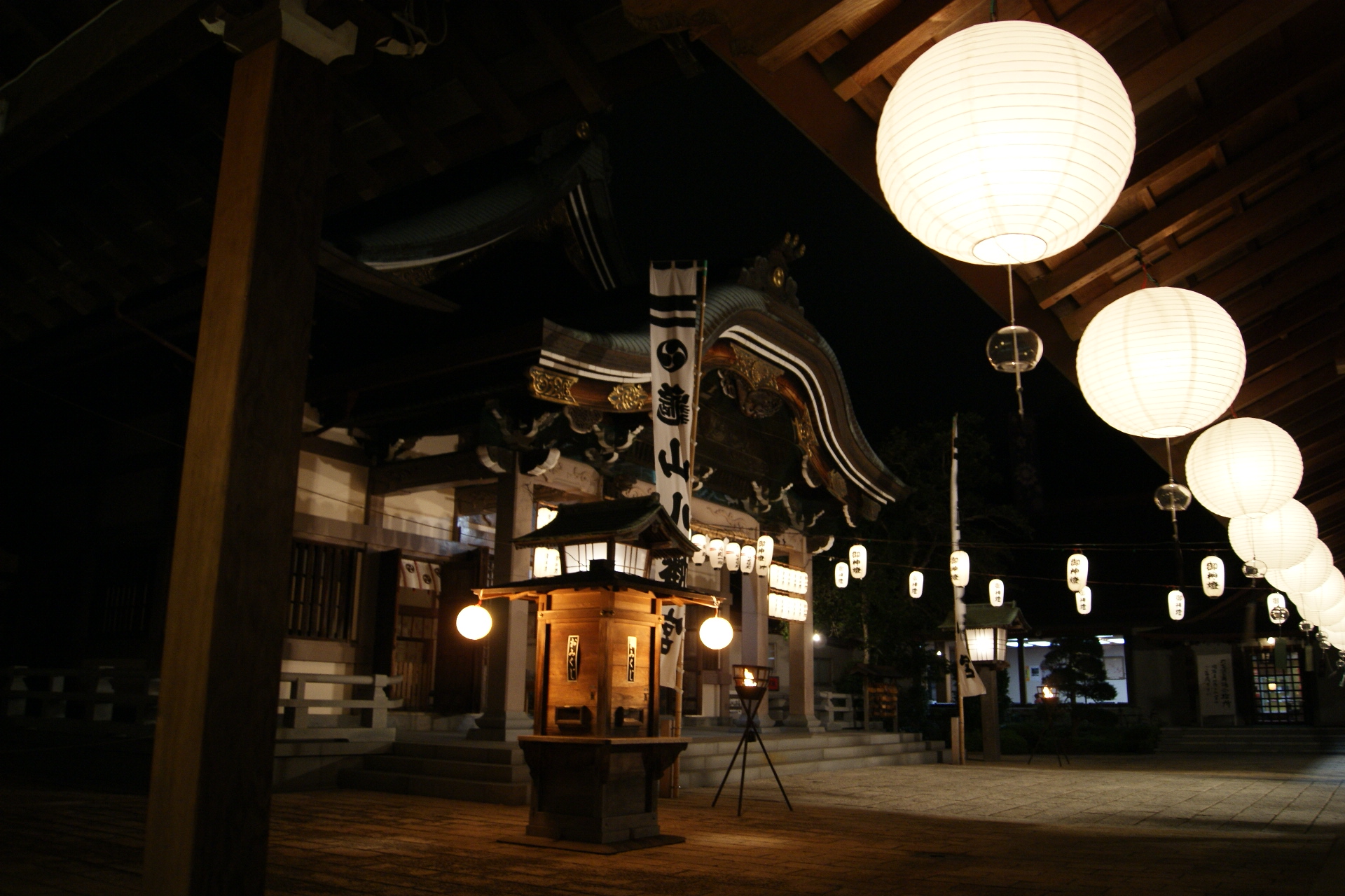 佐世保市亀山八幡宮夏祭りの様子